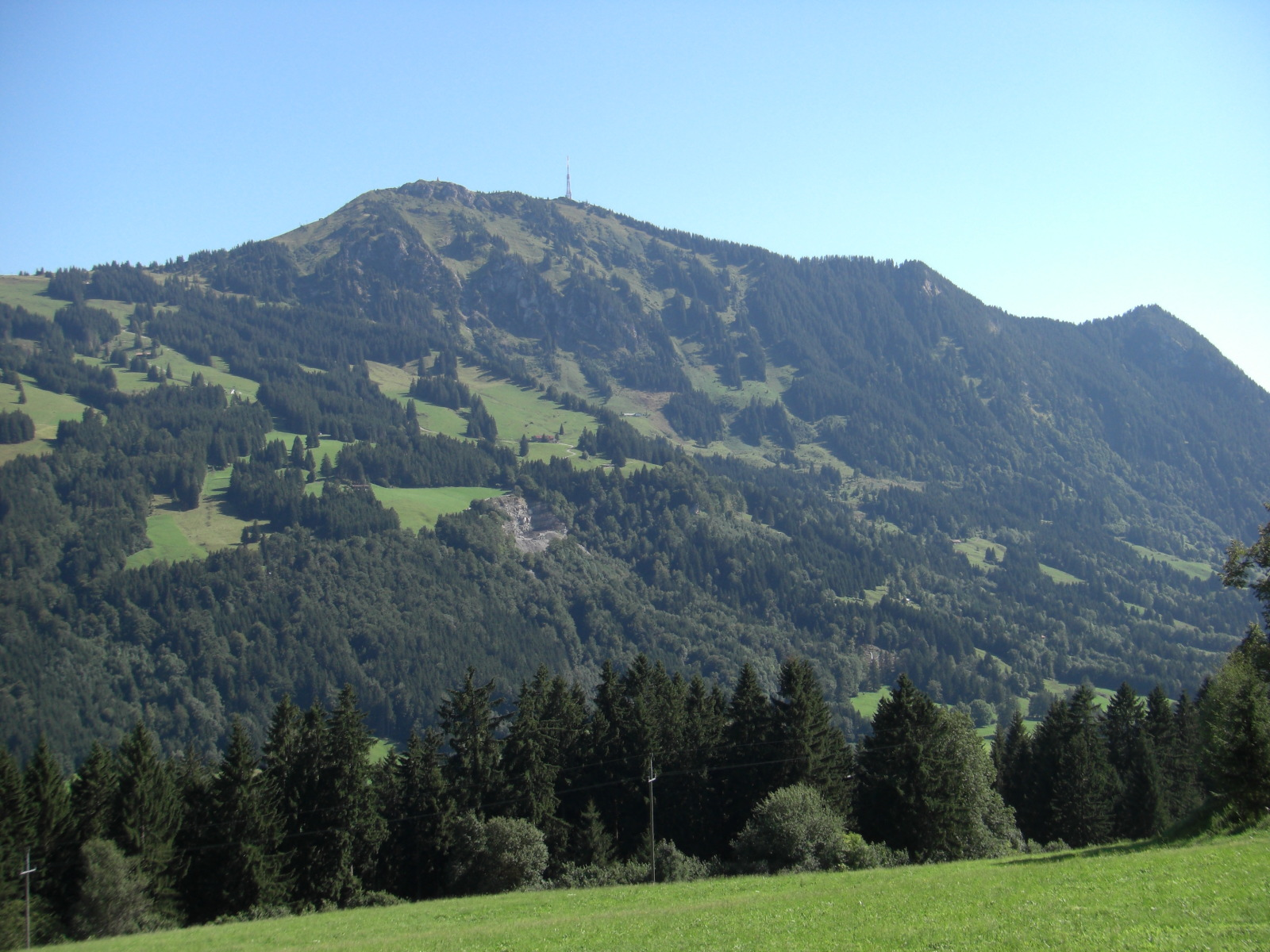 Grünten von Nord/Nordwest